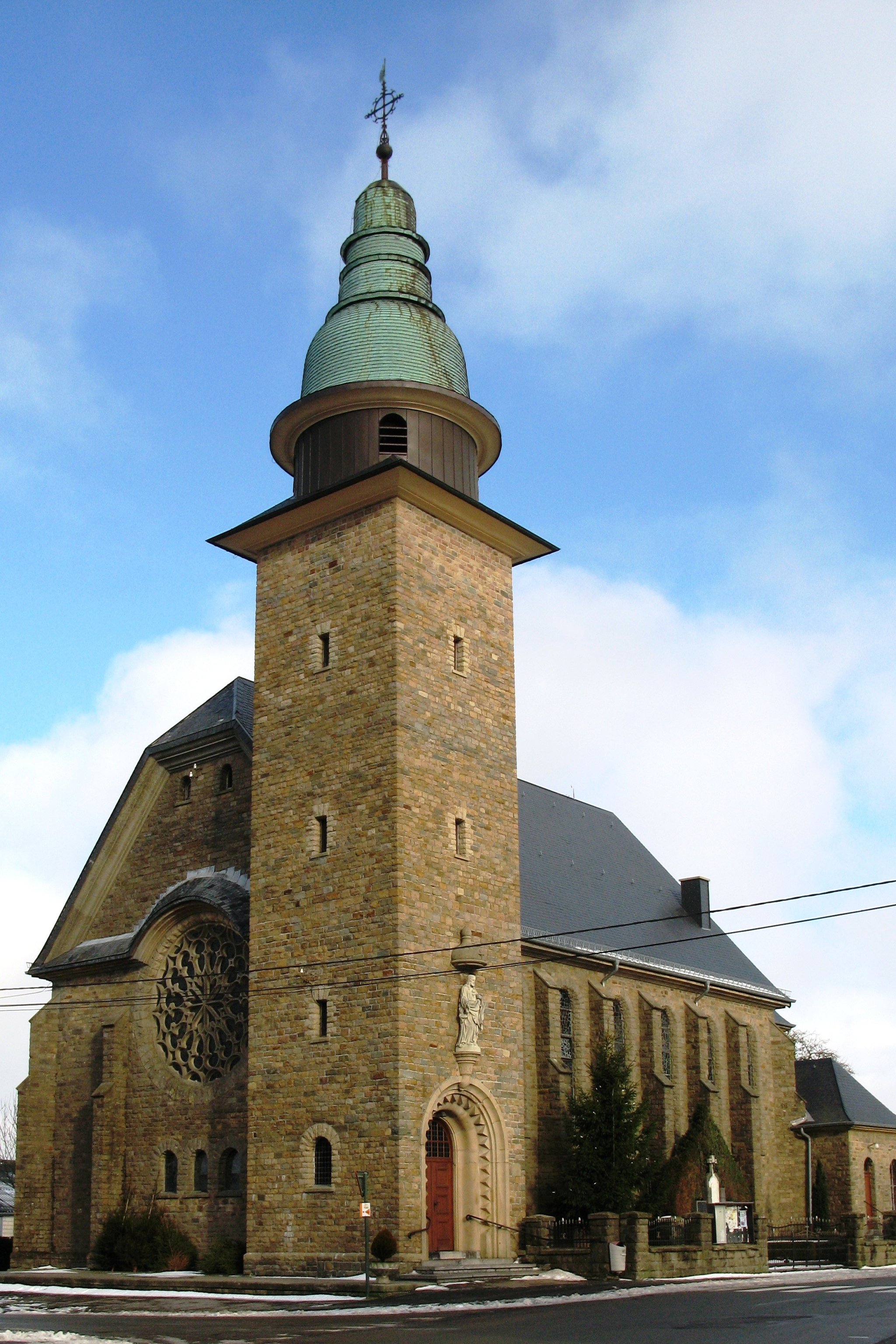 D'Kierch vu Maldingen.